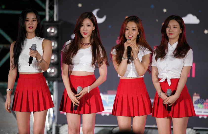 플레이백(PLAYBACK) 한국교통대학교 의왕캠퍼스 축제